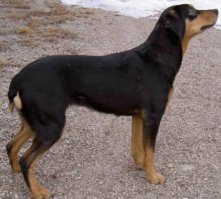 Smaland-Stövare